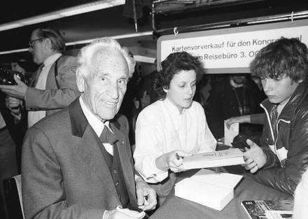 Freiburg im Breisgau: Signierstunde und Vortrag von Louis Trenker